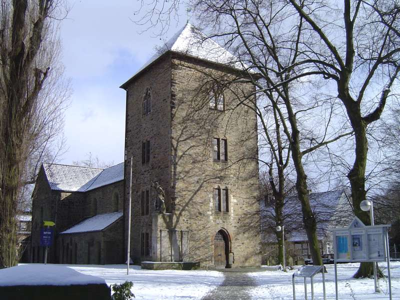 Kirche St. Georg in Dortmund-Aplerbeck